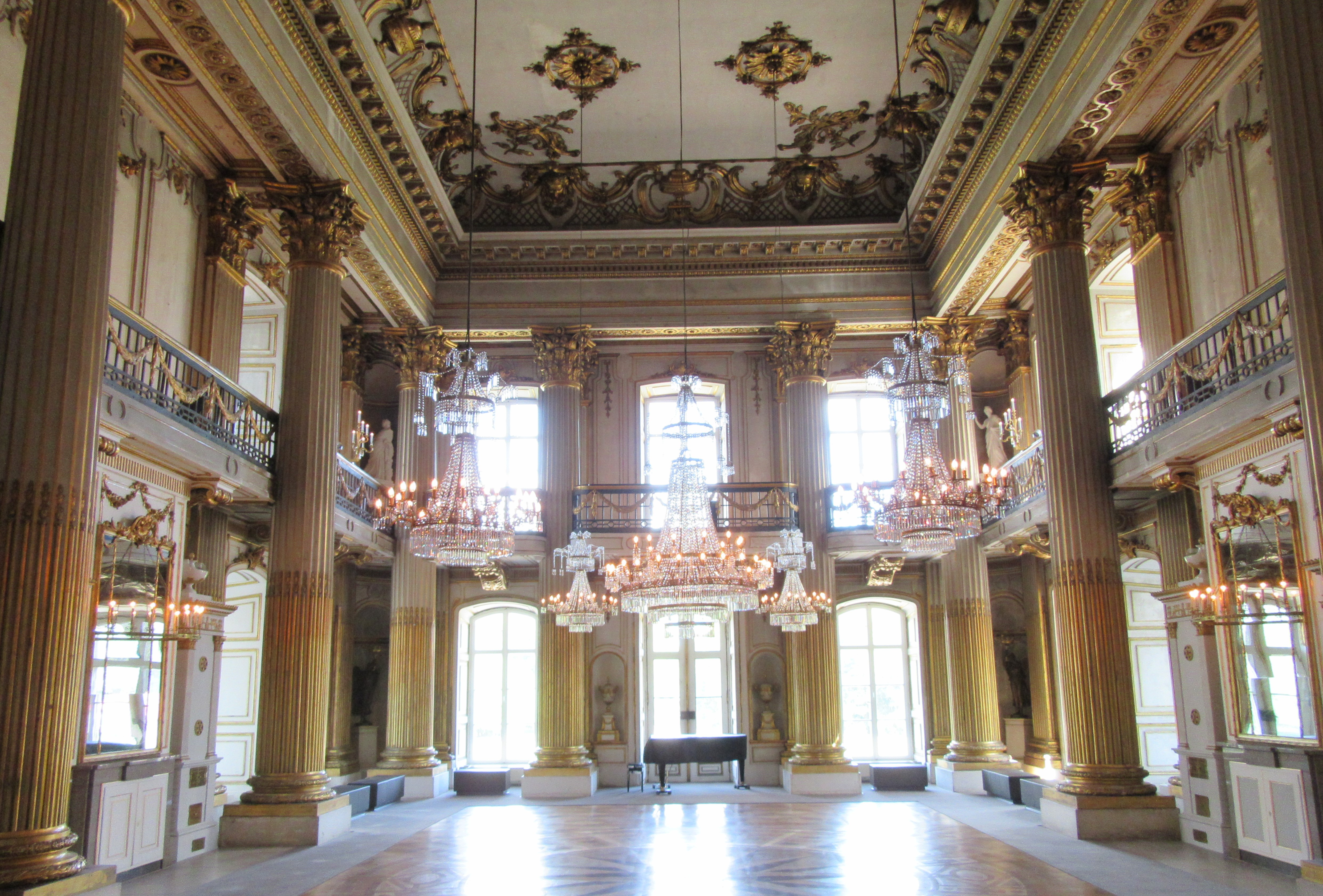 Schloss Ludwigslust Goldener Saal